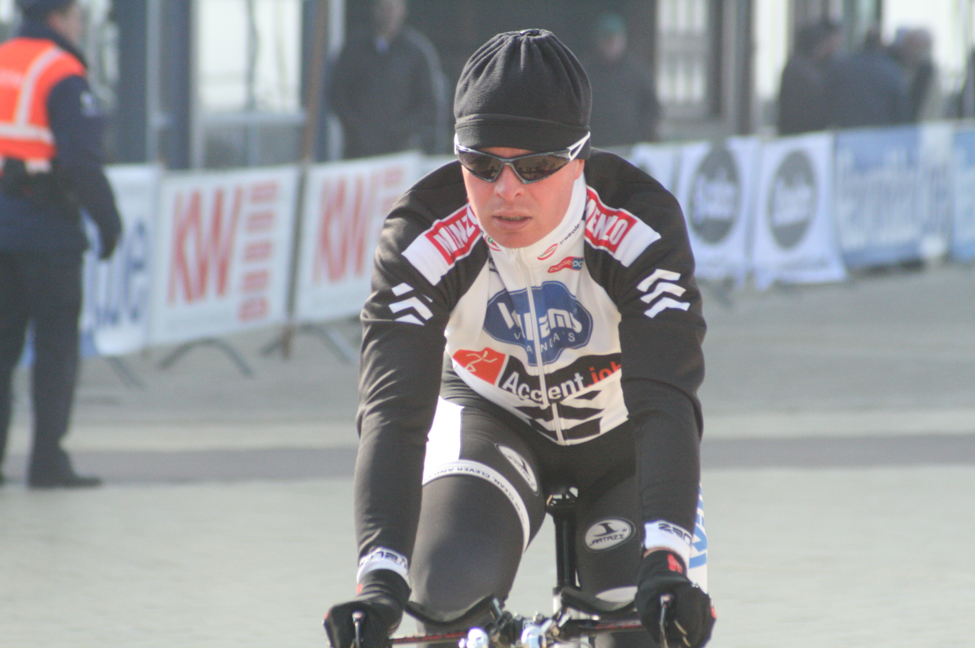 Driedaagse van West-Vlaanderen 2011, proloog in Middelkerke